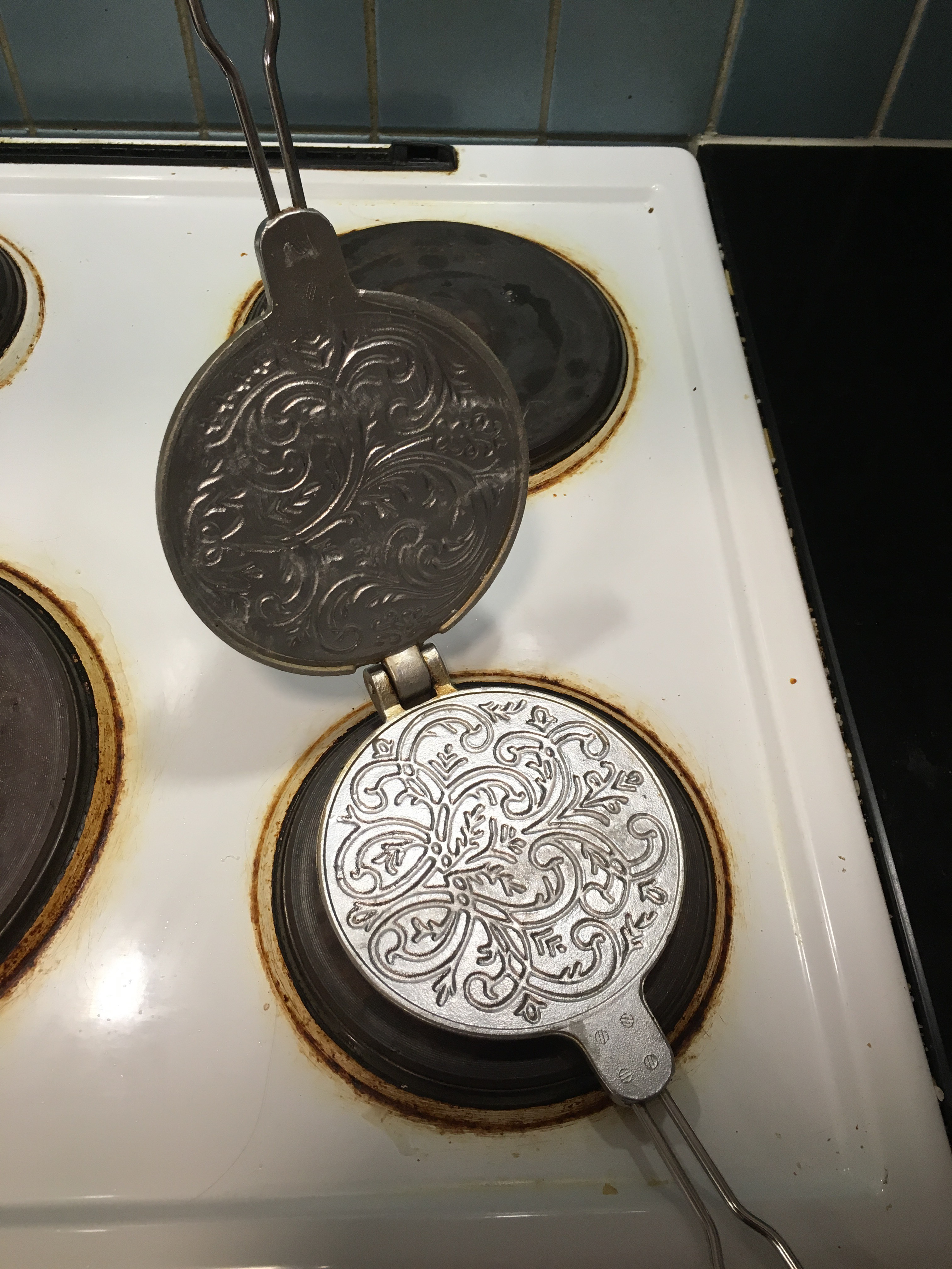 Ett järn för tillagning av gorån.